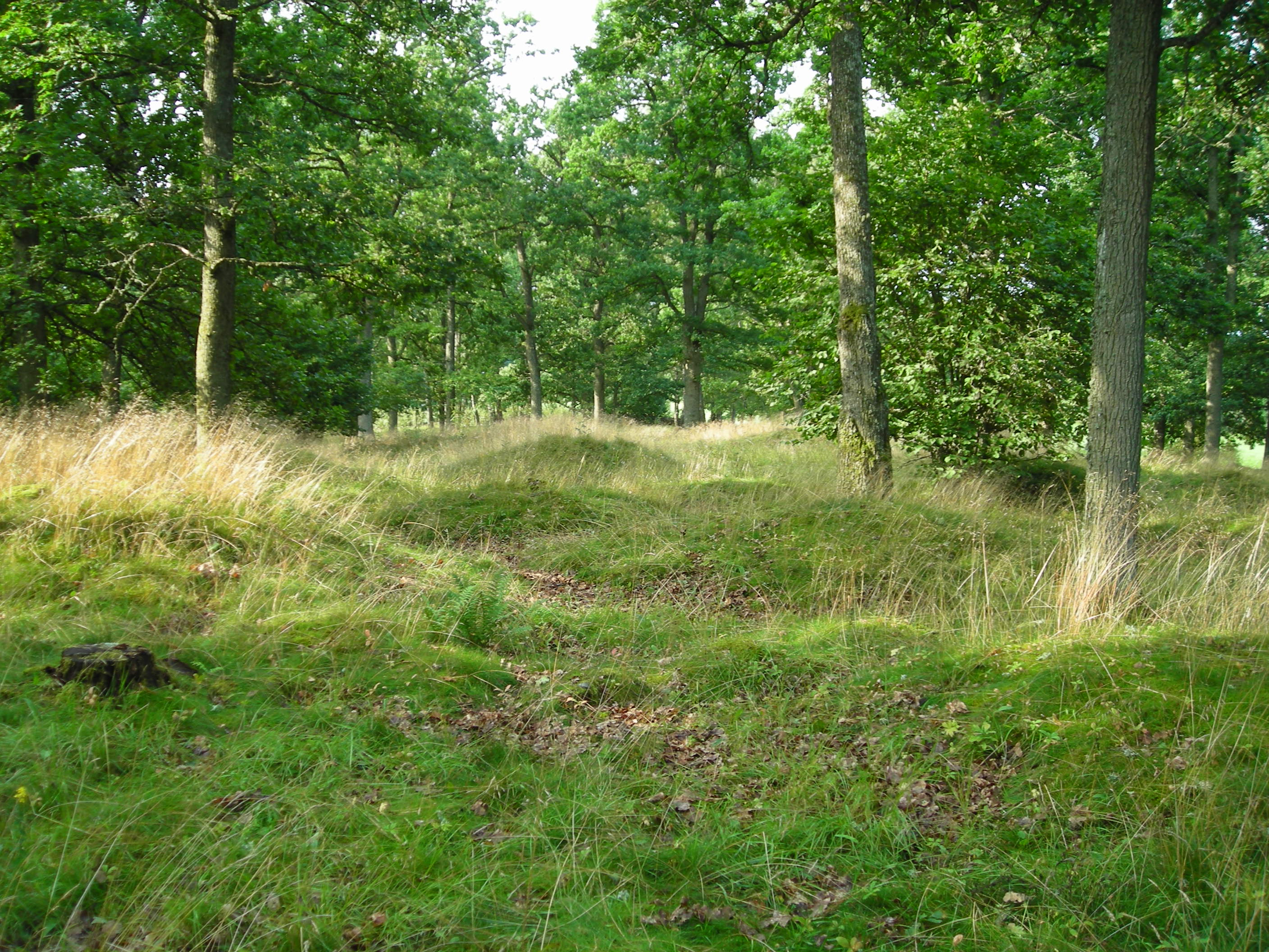 Järnåldersgravfält i Södra Säms socken, Ulricehamns kommun